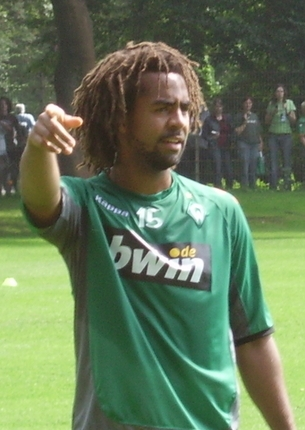 Patrick Owomoyela / Trainingsanlagen am Weserstadion, Werder Bremen